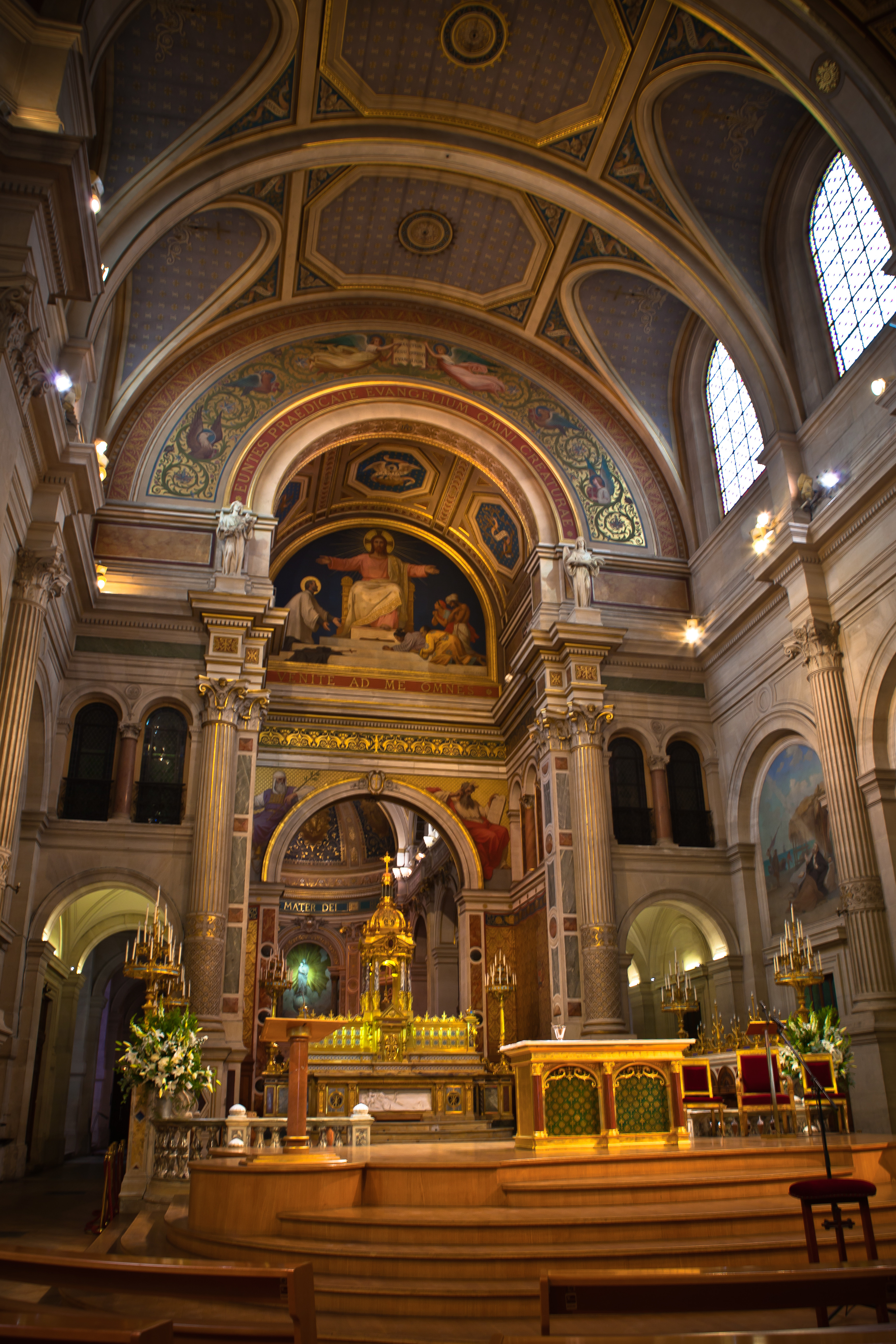 Église Saint-François-Xavier (Paris)